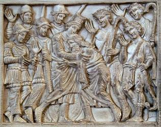 catedra